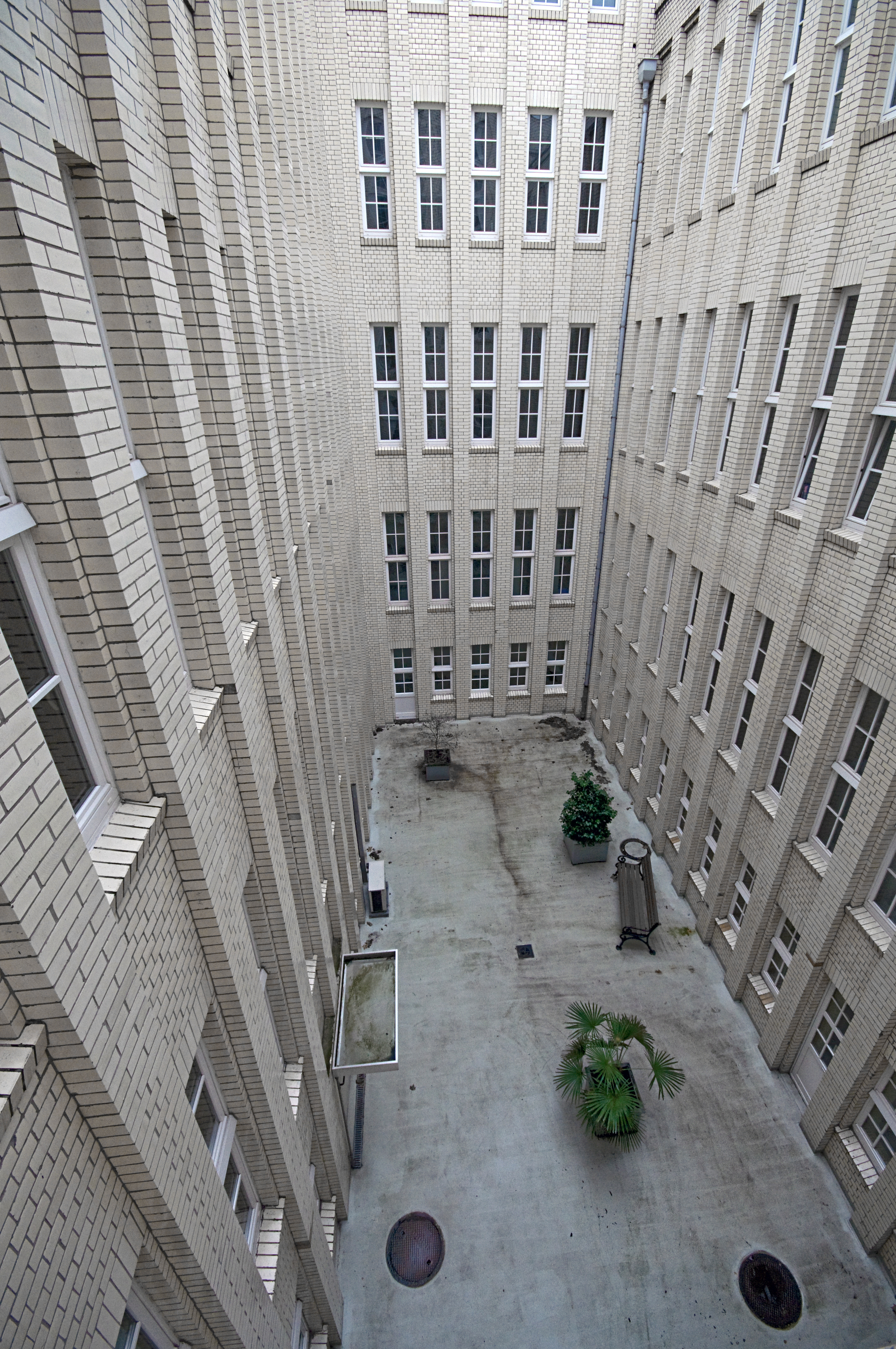 Industriepark HöchstBehrensbau: Blick in den Innenhof